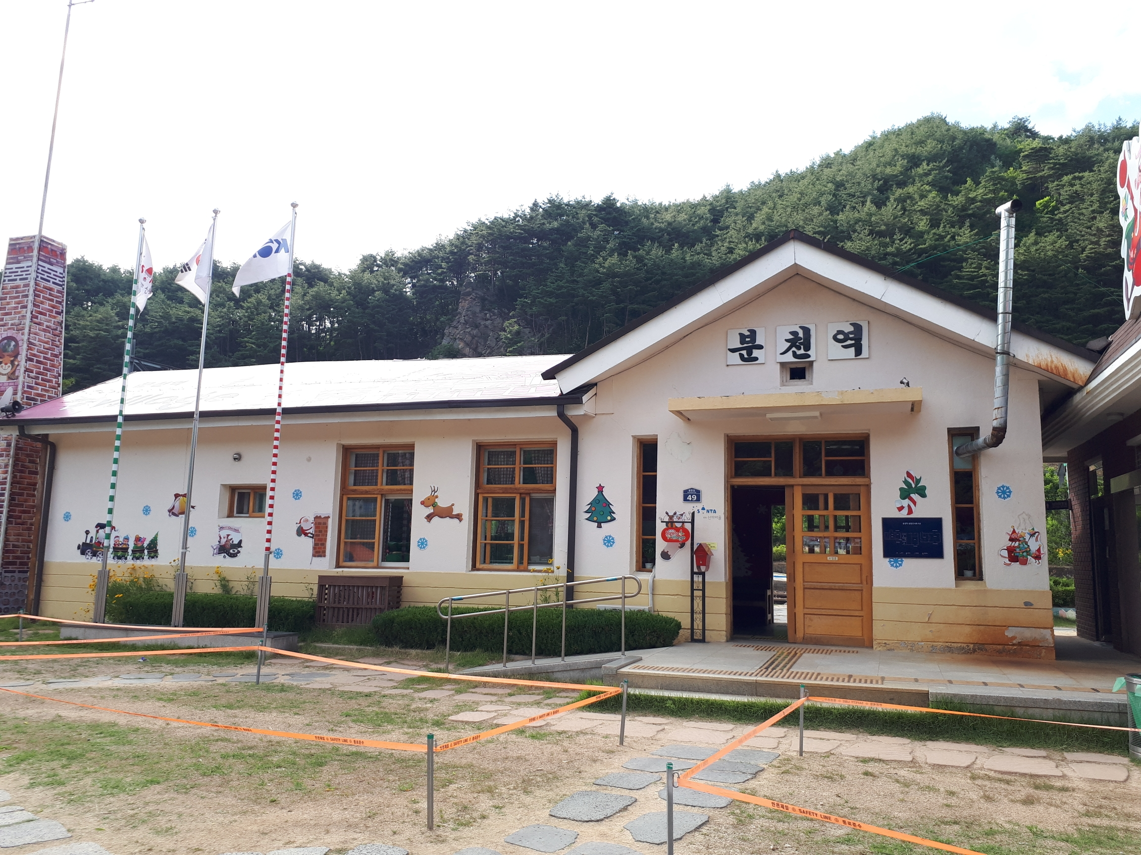 경상북도 봉화군 소천면에 위치한 영동선의 철도역인 분천역.